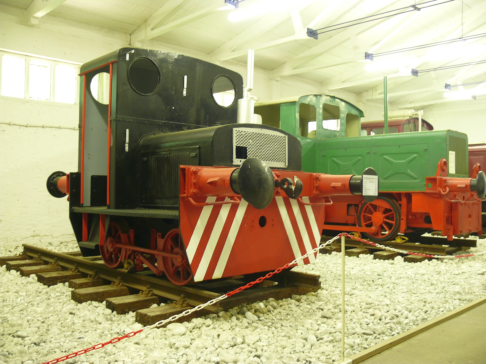 Deutz OME117R (16288/1936), Prora, Eisenbahn & Technik-Museum, 08.06.2013